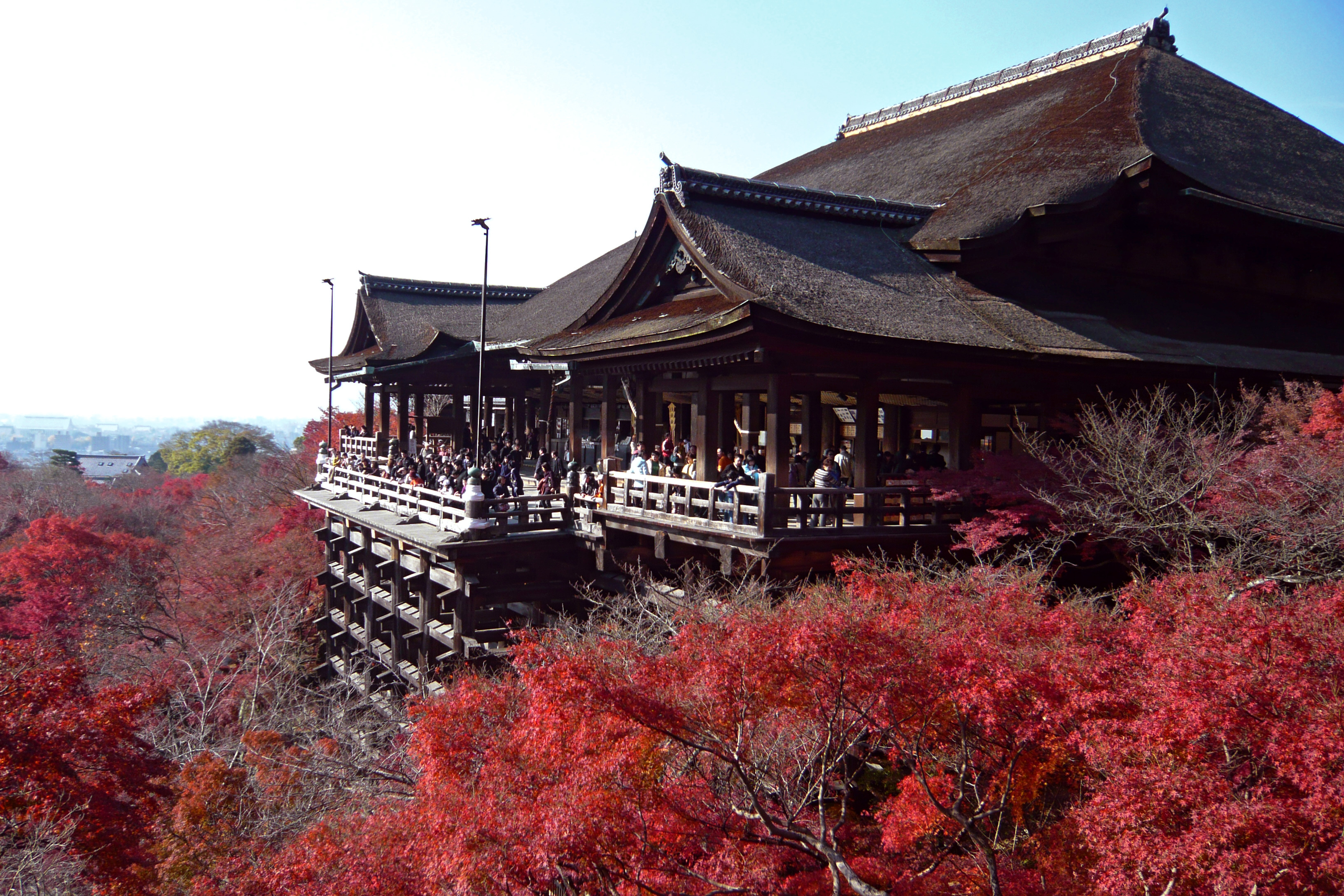 Kiyomizu-dera (清水寺), Kyoto, Kyoto prefecture, Japan